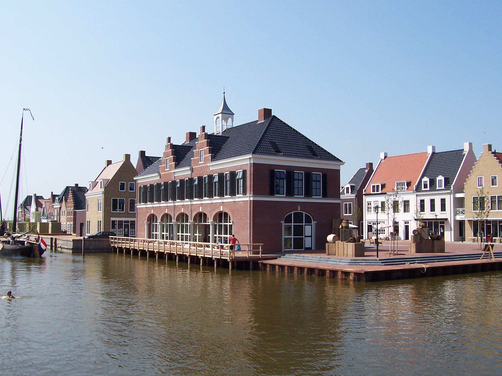 Anjum: Blick auf Ferienpark Esonstad von Oostmahorn aus